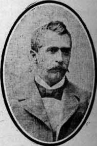 El escritor satírico chileno Juan Rafael Allende (1848-1909)/Juan Rafael Allende, Chilean writer.